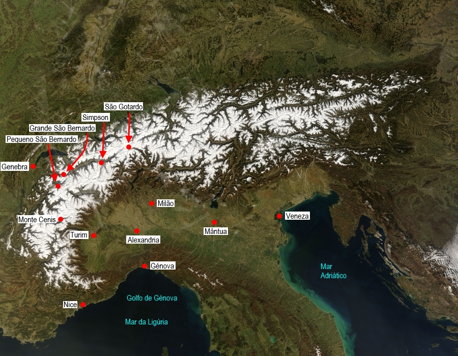 Alpes e bacia do Pó. Passagens dos Alpes utilizadas pelas tropas francesas para entrar no Norte de Itália durante a Segunda Campanha de Napoleão em Itália.